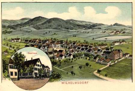 Ansichtskarte aus Wilhelmsdorf